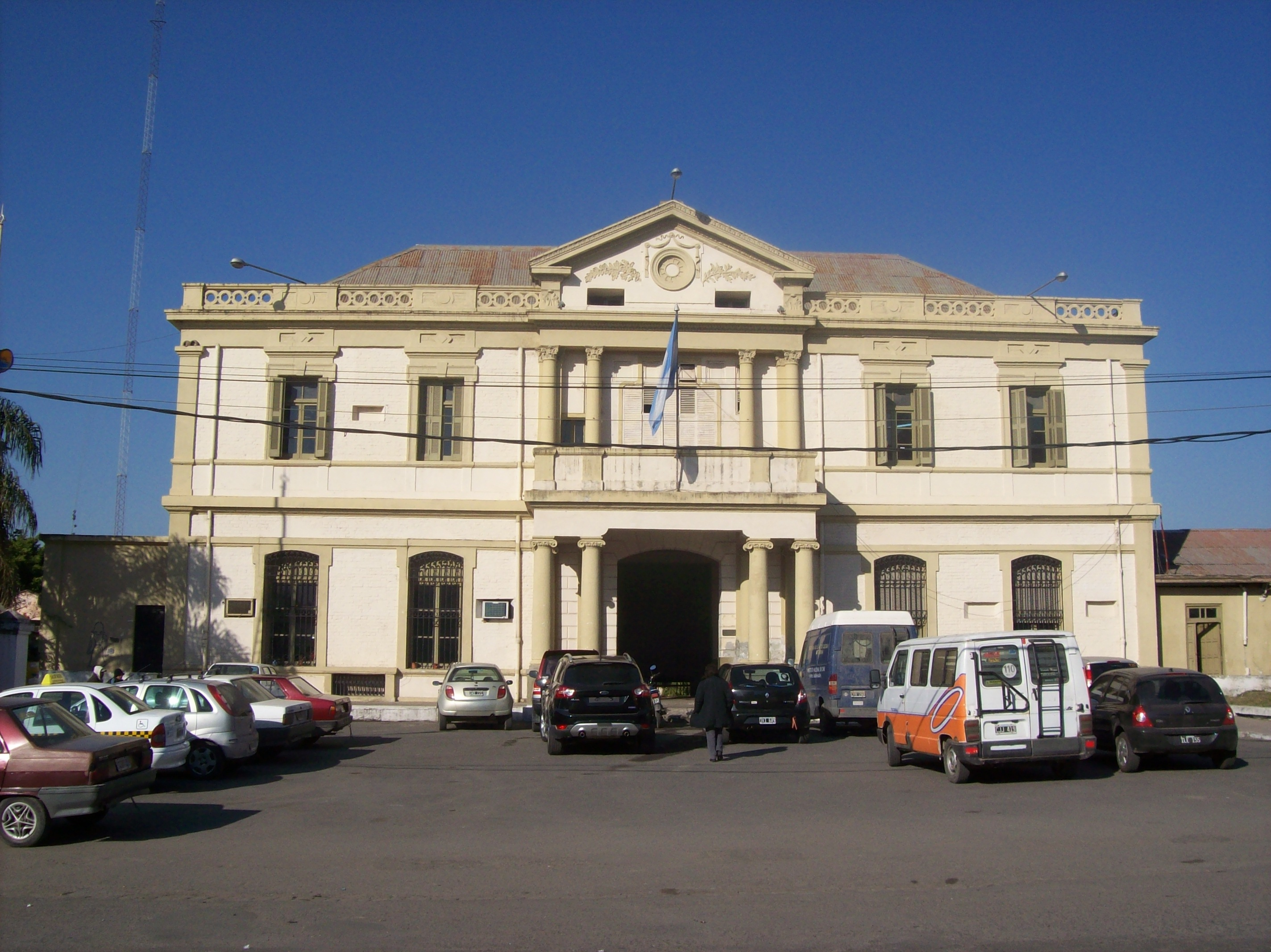 Edificio de la ex-estación El Bajo, también conocida como Tucumán N, del FCGB en la ciudad de San Miguel de Tucumán, provincia de Tucumán, Argentina.